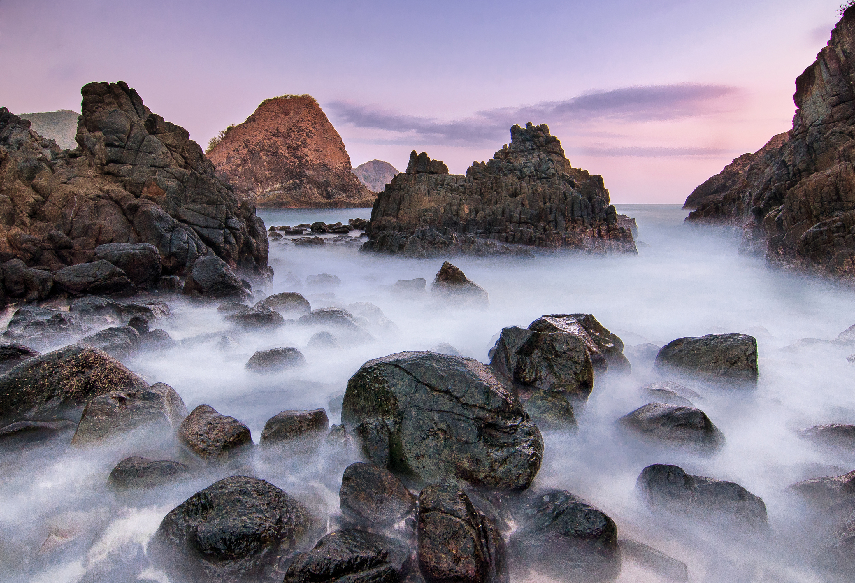 Pantai Telawas adalah Pantai berbatu indah yang terletak di Lombok Tengah,NTB